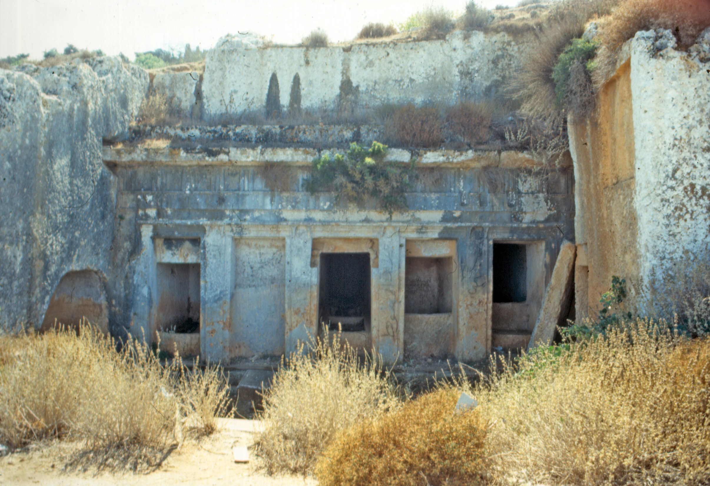 Libia, Cirene (sito archeologico), Necropoli, tomba scavata nella roccia